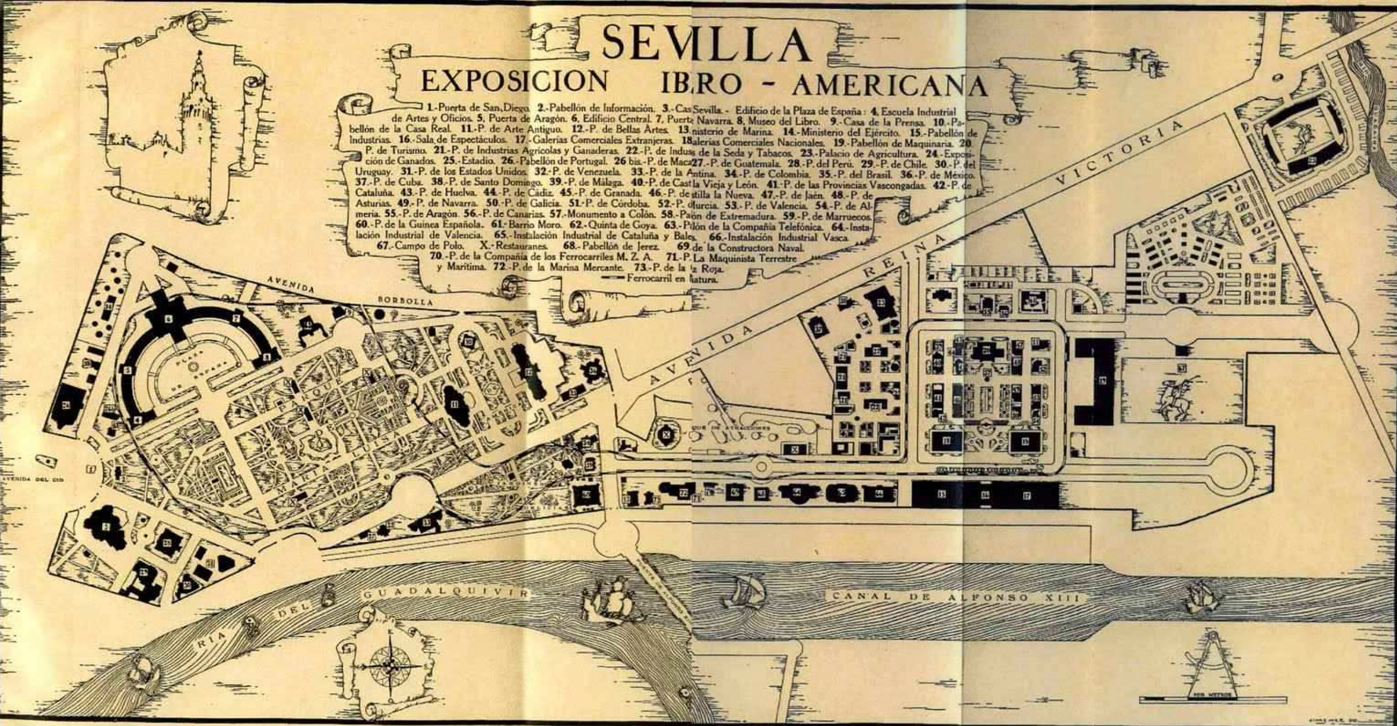 Plano de la Exposición Iberoamericana Americana de 1929 de Sevilla. (1929)